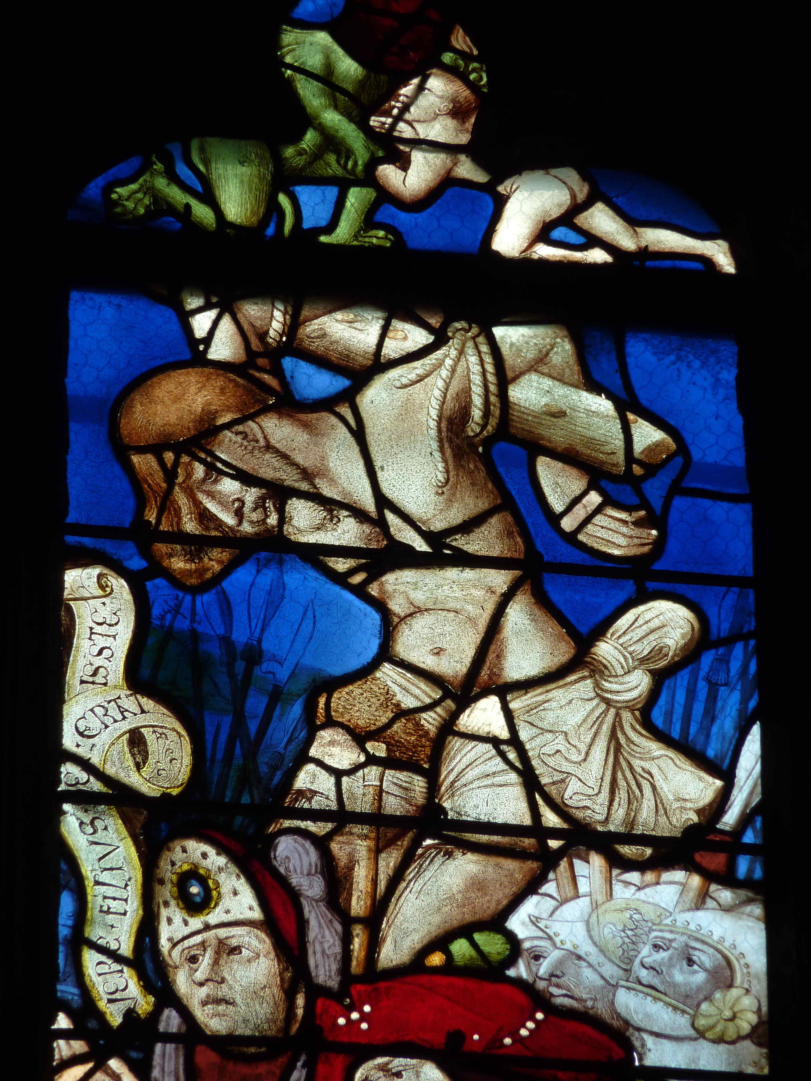 Katholische Kirche Saint-Pierre in Dreux im Département Eure-et-Loir (Centre-Val de Loire/Frankreich), Bleiglasfenster aus dem 16. Jahrhundert in der Martinskapelle; Darstellung: Christus am Kreuz; Ausschnitt: Gestas, der böse Schächer